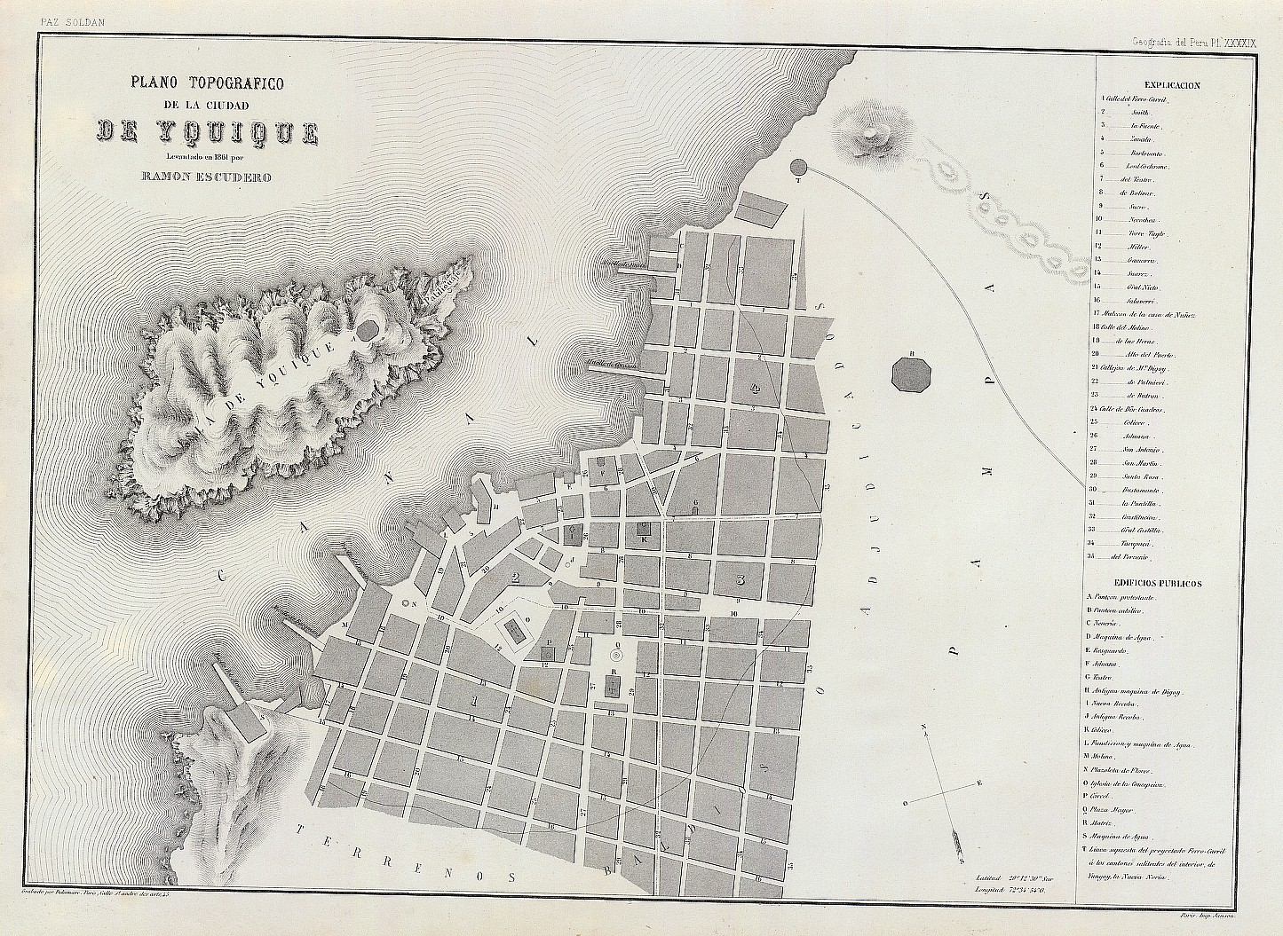 Plano topografico de la Ciudad de Yquique Perú. Levantado en 1861 por Ramon Escudero. Paz Soldan. Geografia del Peru. Grabado por Delamare, Paris, Calle St. Andre des Arts, 45. Paris, Imp. Janson. (Paris, Libreria de Augusto Durand, 1865)